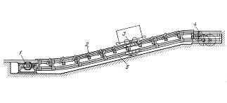 Bremsberg, Schnittzeichnung.